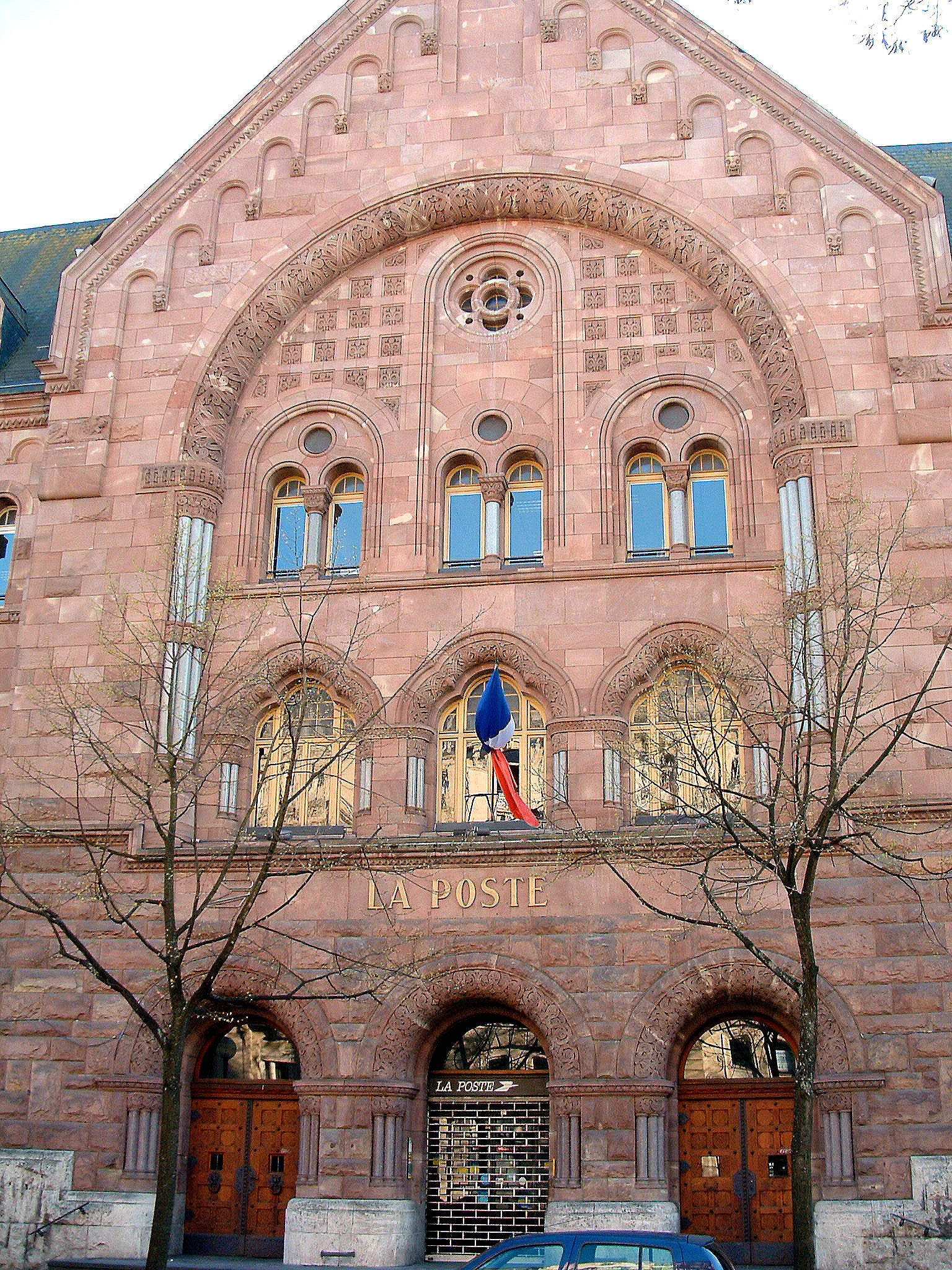 Metz - Poste principale - Façade sur la rue Gambetta